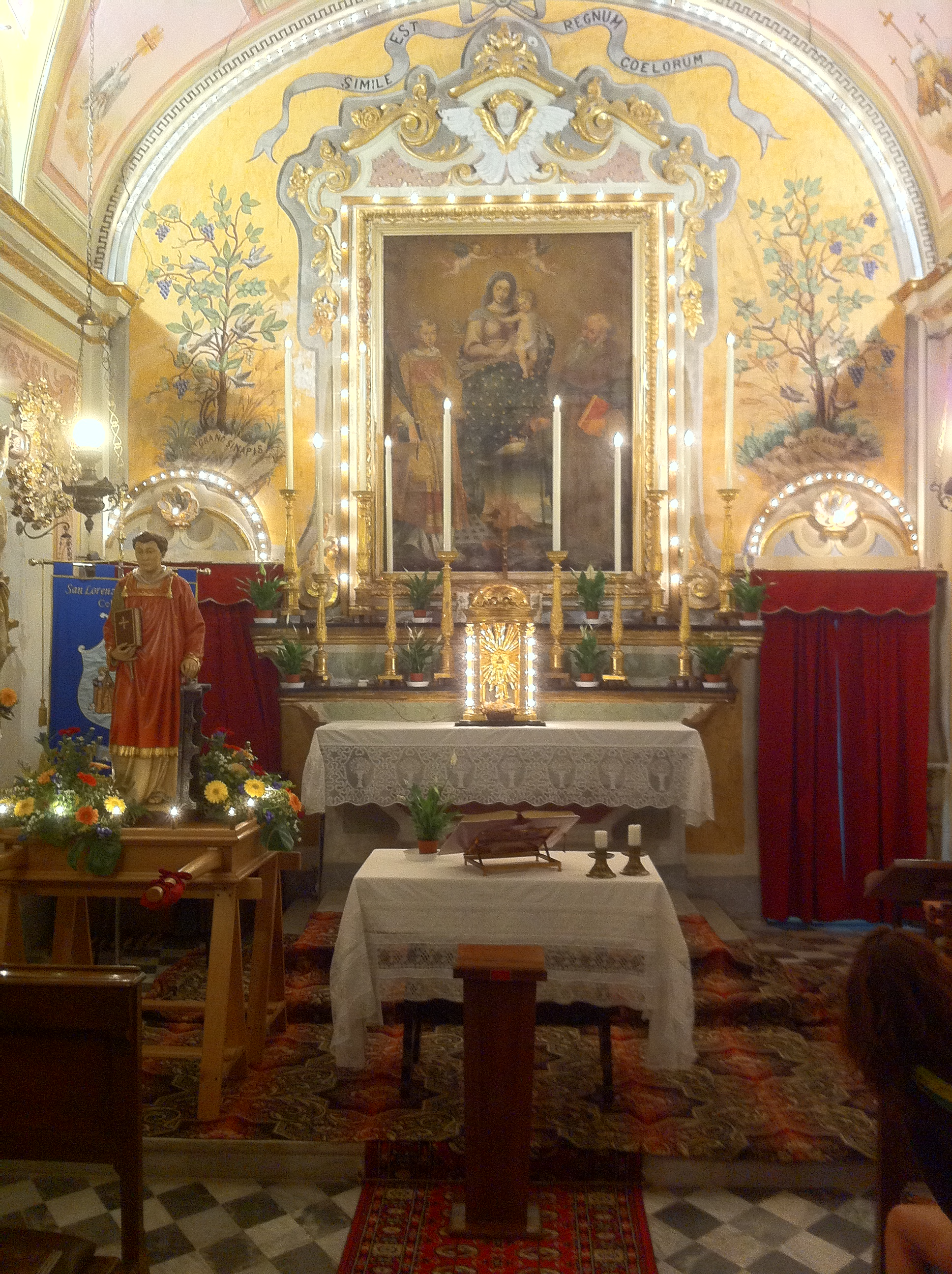 Interno della cappella di San orenzo di località Ferrari in Celle Ligure (Italy)